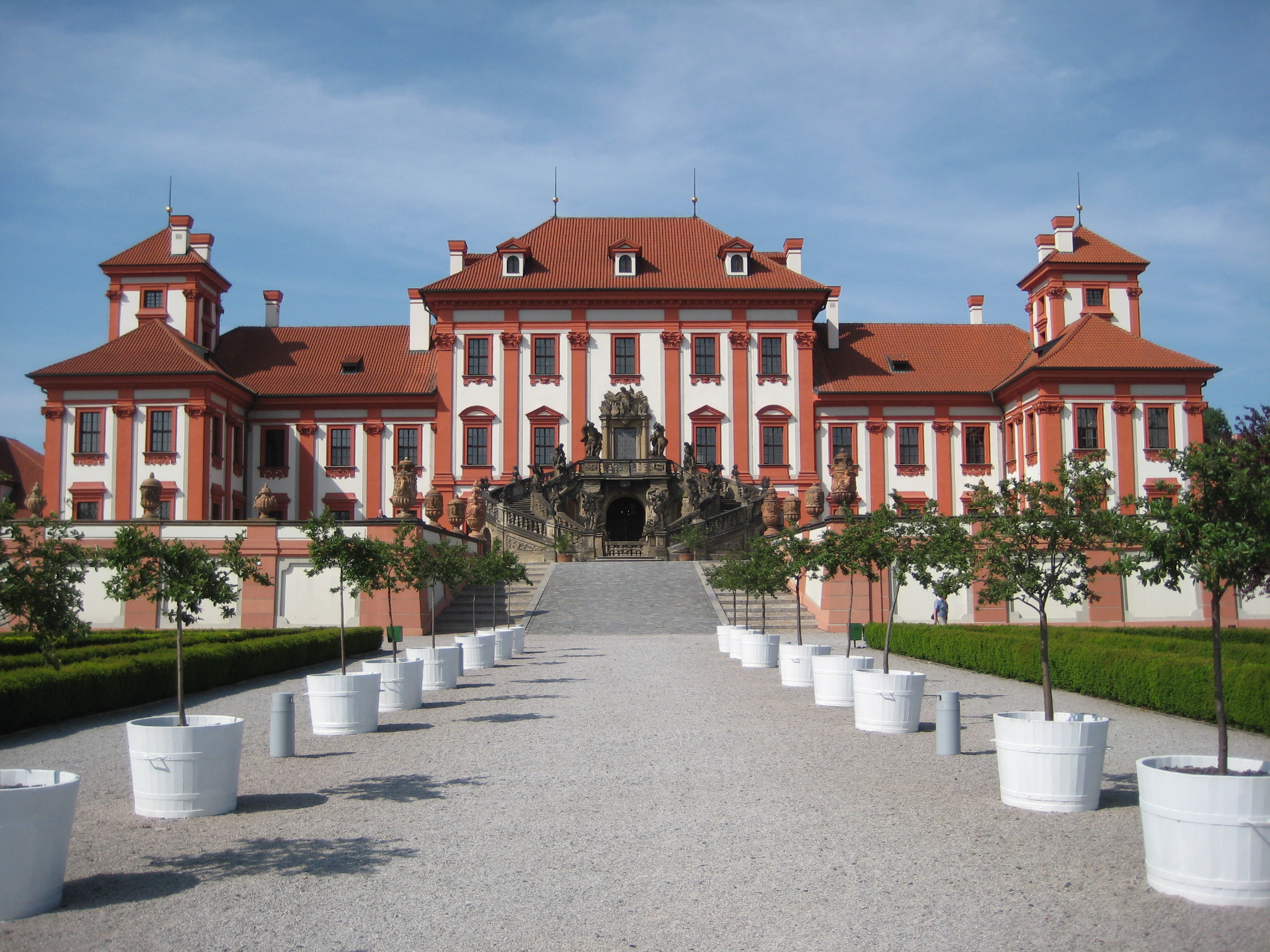 Schloss Troja, Prag